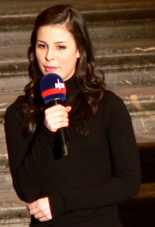 Lena Meyer-Landrut, Empfang im Neuen Rathaus von Hannover.